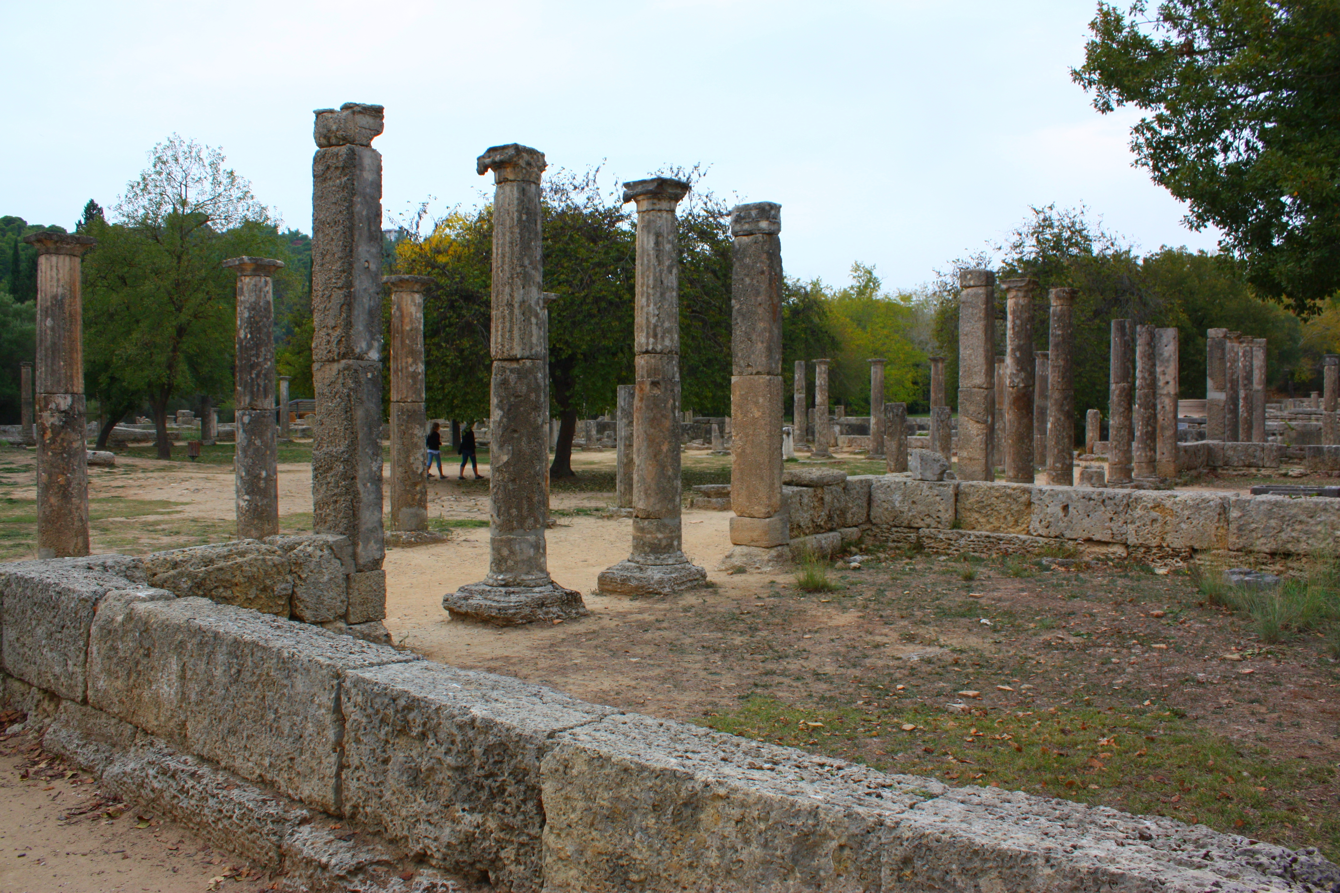 Olümpia romjai 02